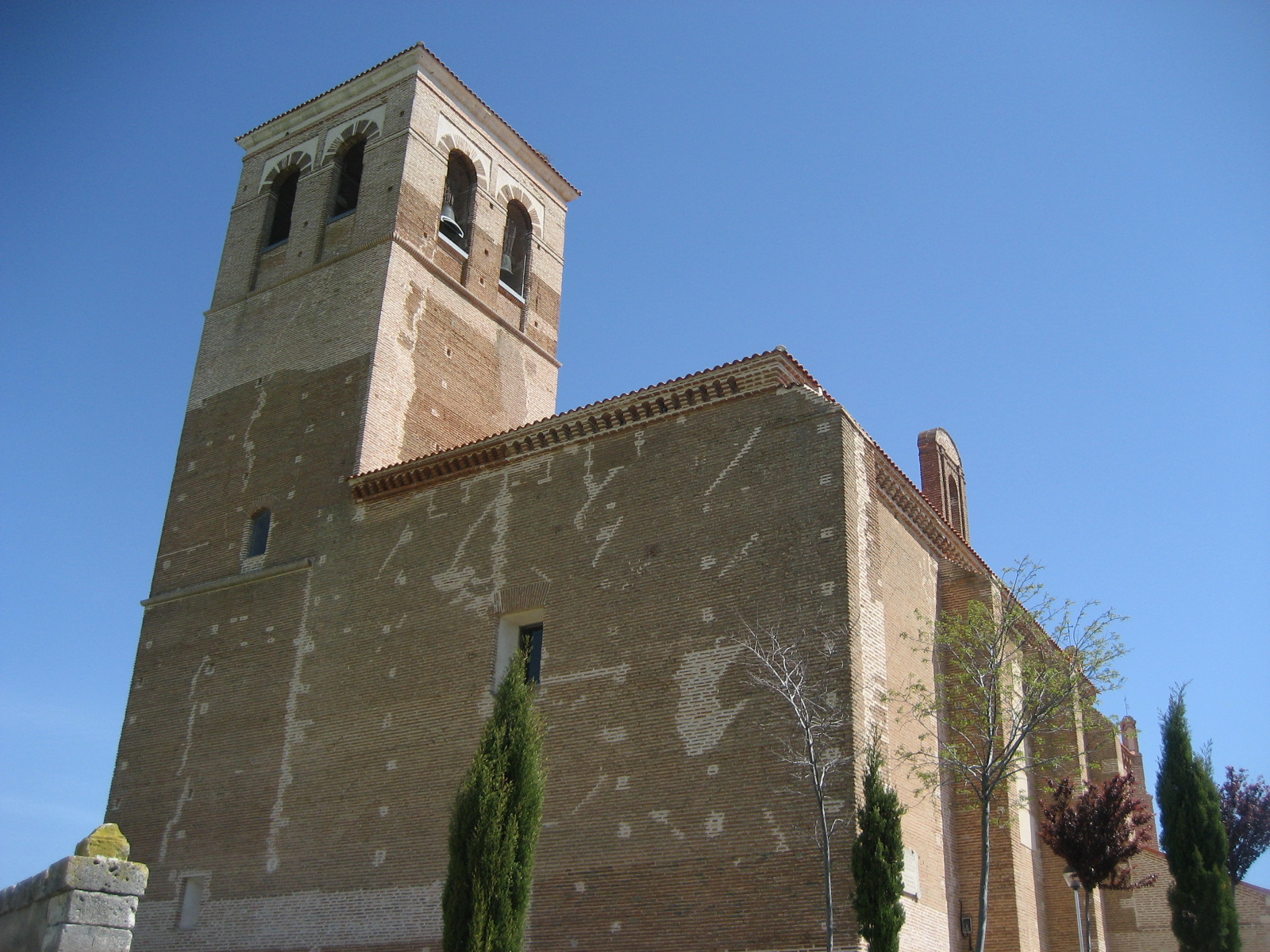 Iglesia de Ventosa de la Cuesta, Valladolid (España).